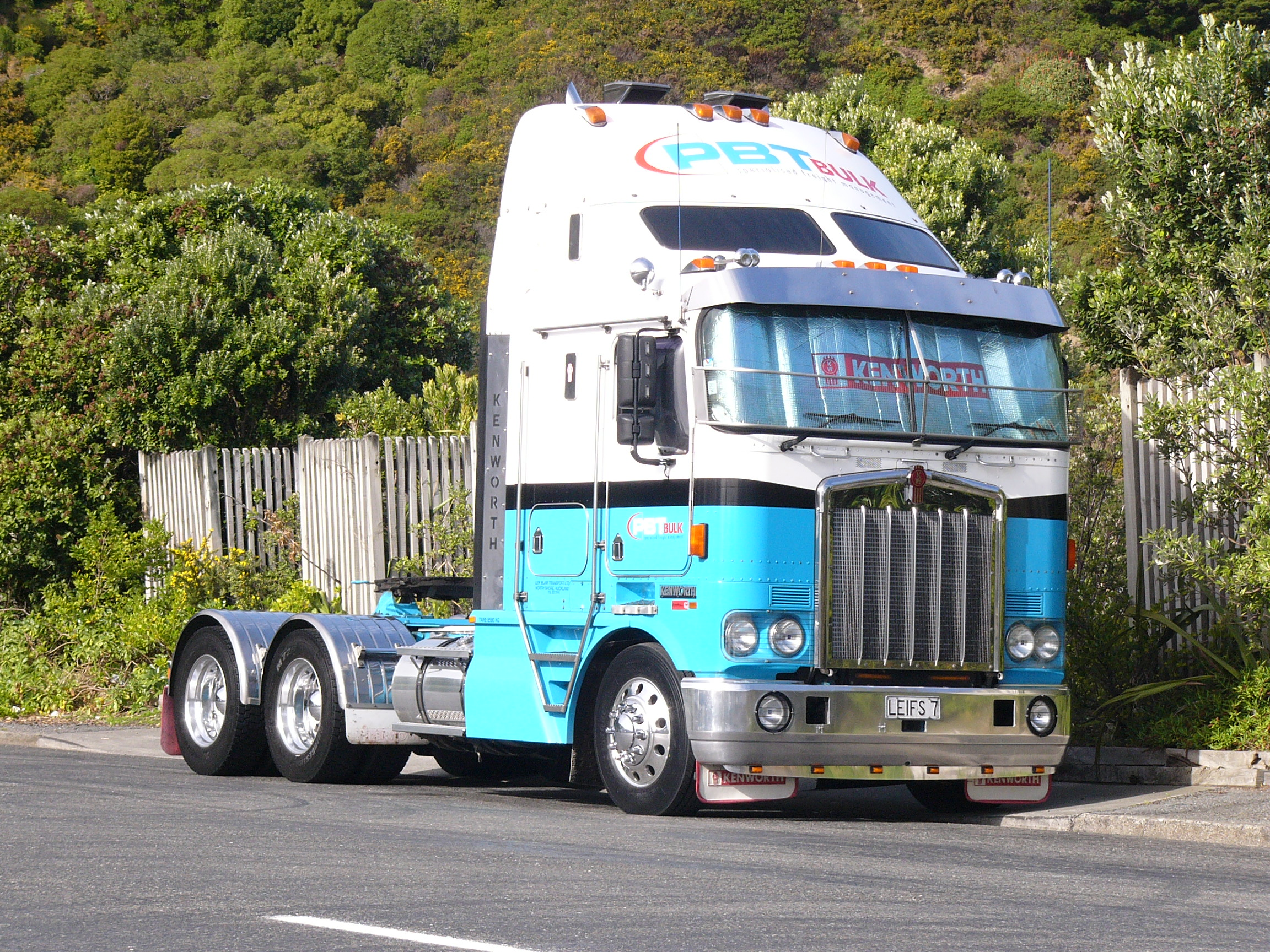 2005 Kenworth K104